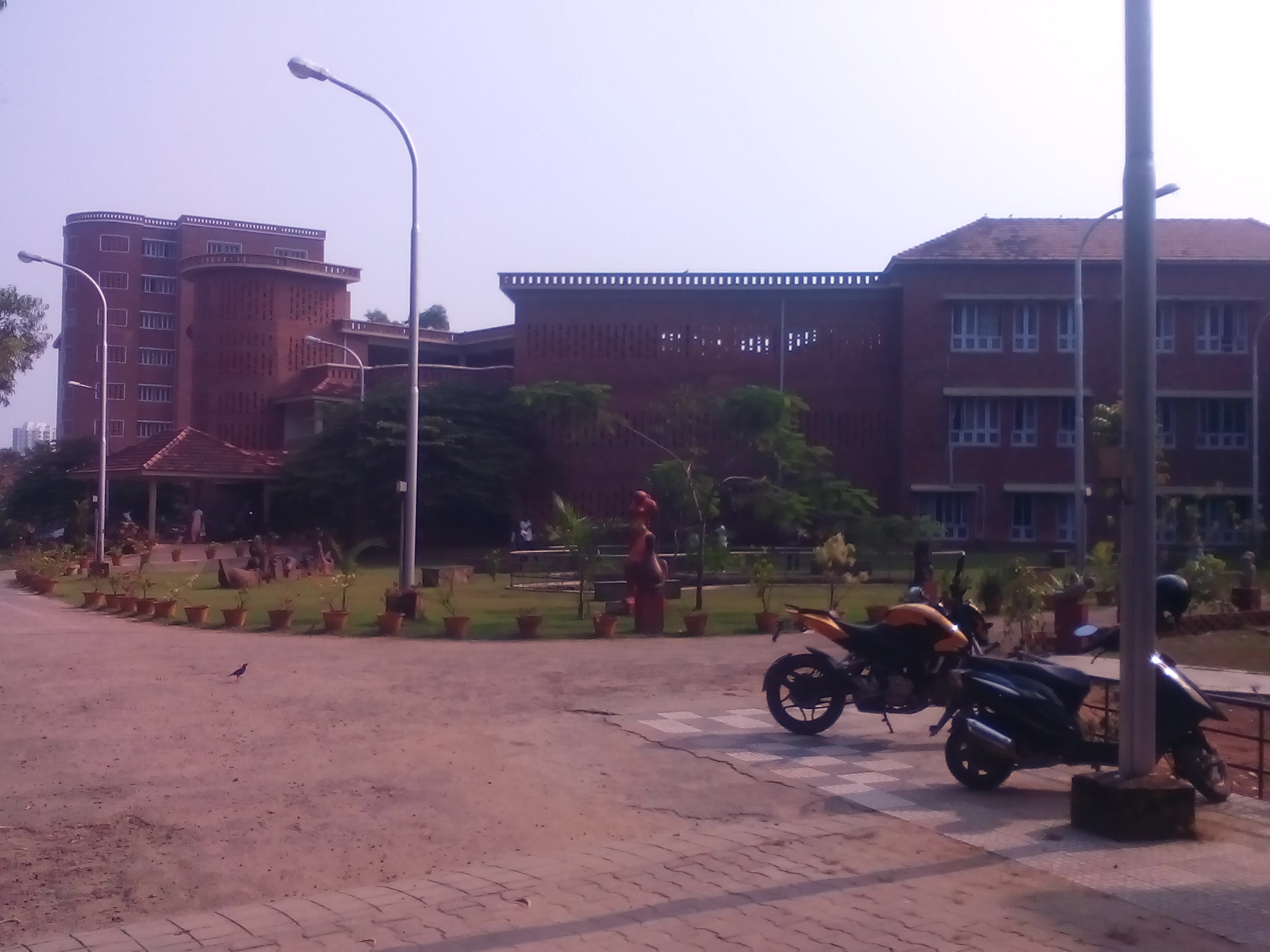 നിഷ് (നാഷണല്‍ ഇന്‍സ്റ്റിറ്റ്യൂട്ട് ഓഫ് സ്പീച് ആന്‍ഡ്‌ ഹിയറിംഗ്)